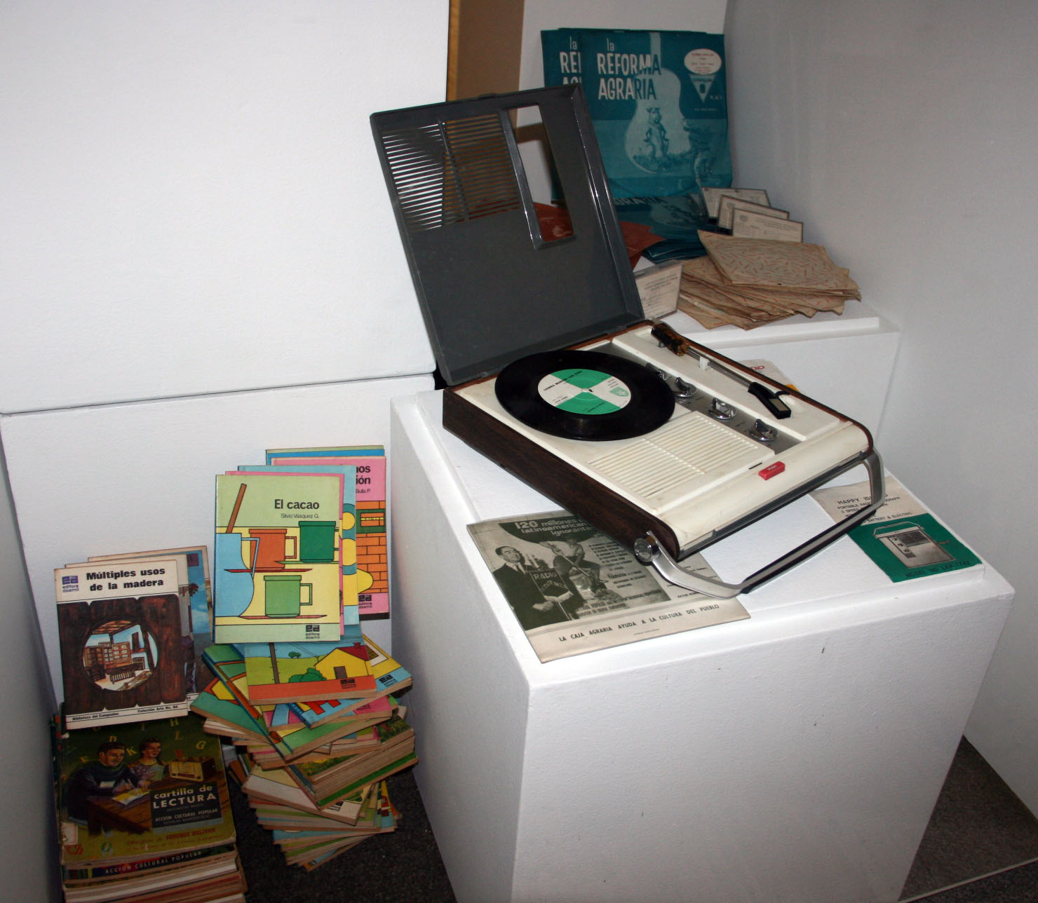 Medio de acción - Cartillas